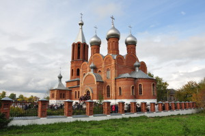 Церковь Всех святых, в земле Российской просиявших (Кирово-Чепецк)